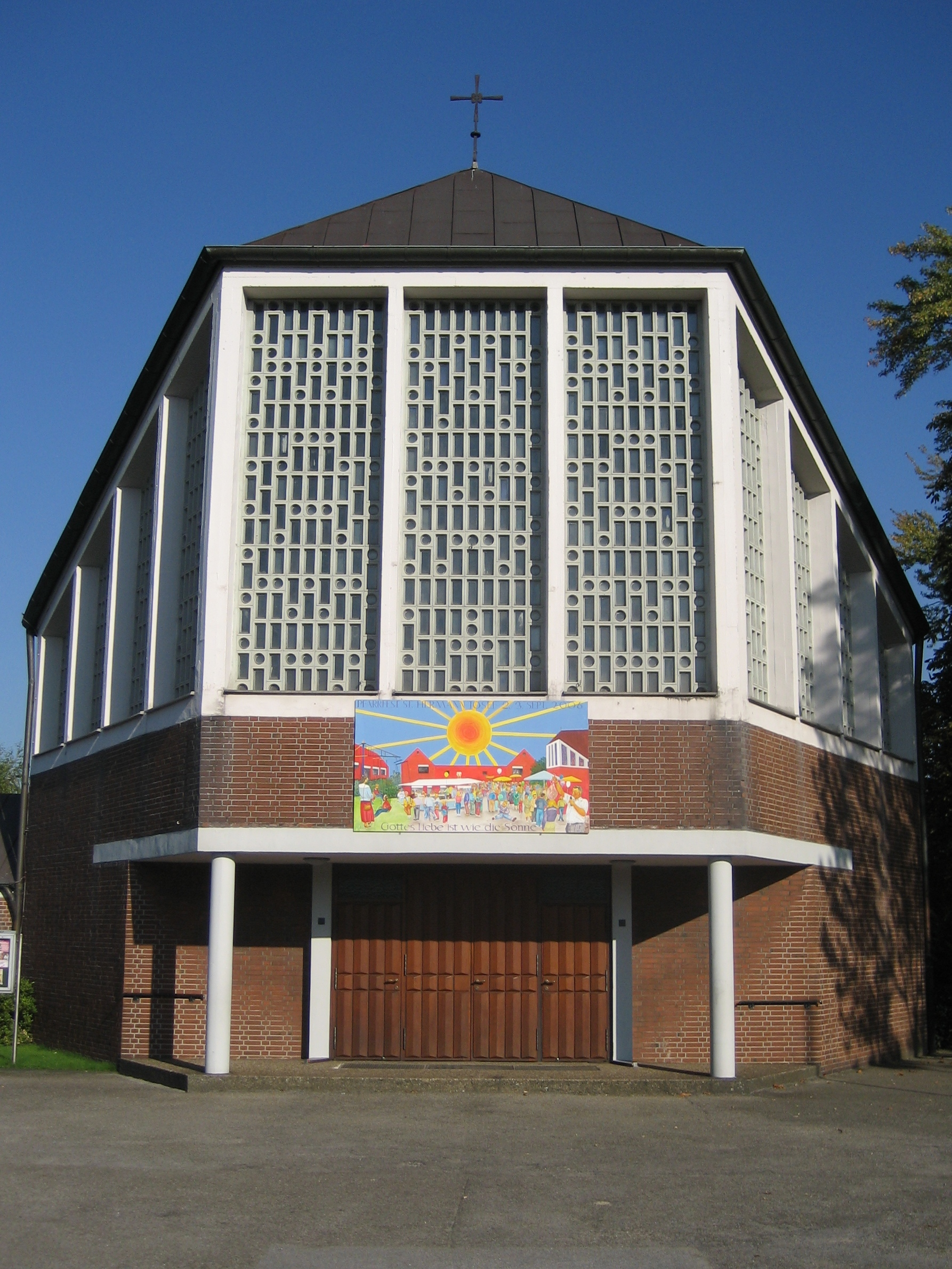 Kirche St. Hermann-Josef, Essen-Dellwig